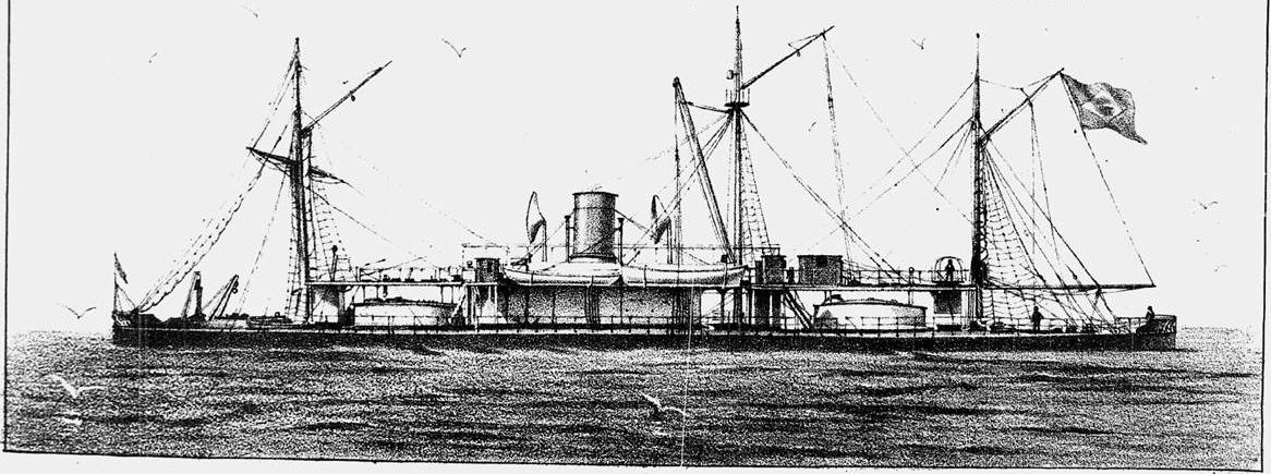 Monitor Solimões